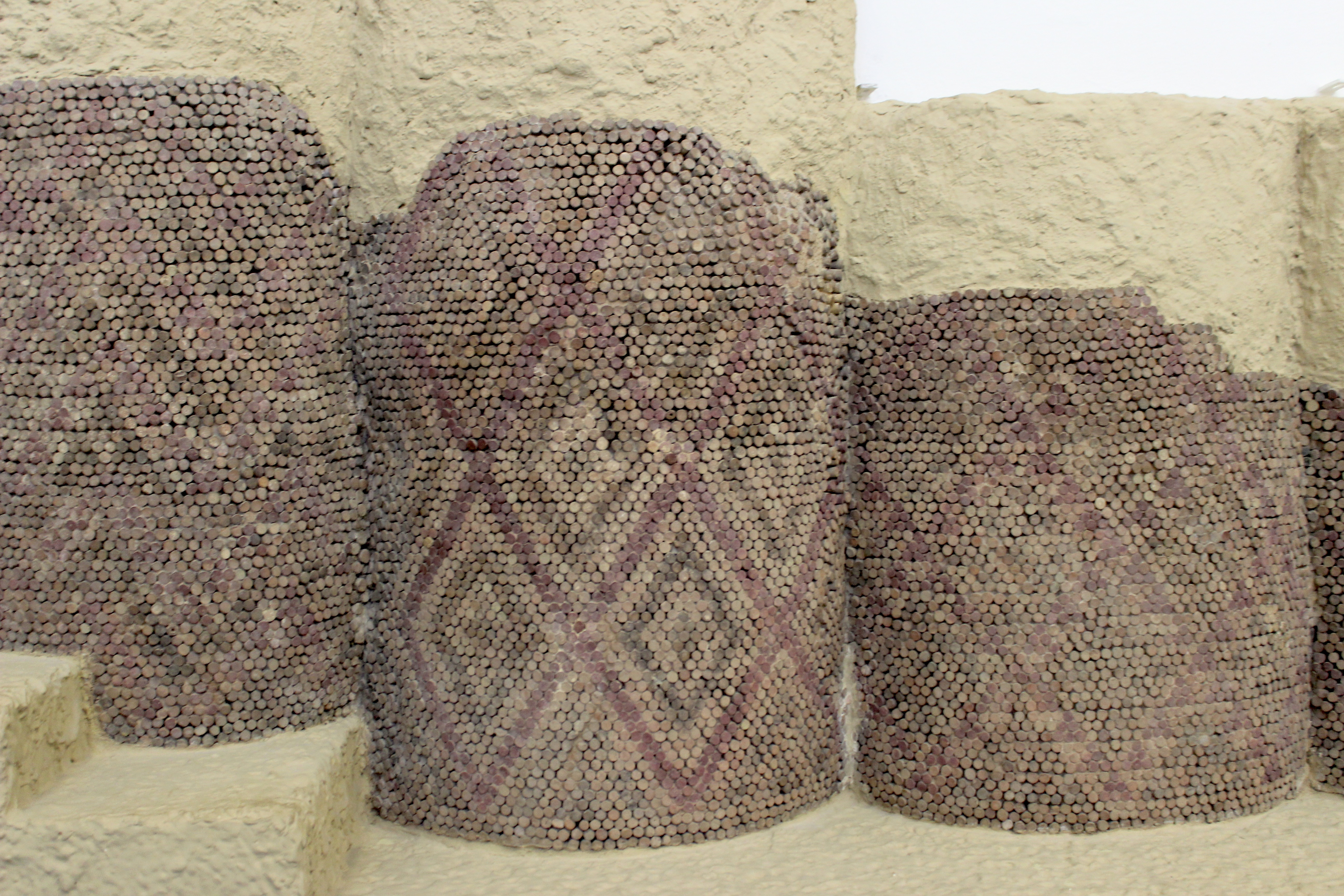 Berlín, decoración de conos de cerámica policromada de un templo.